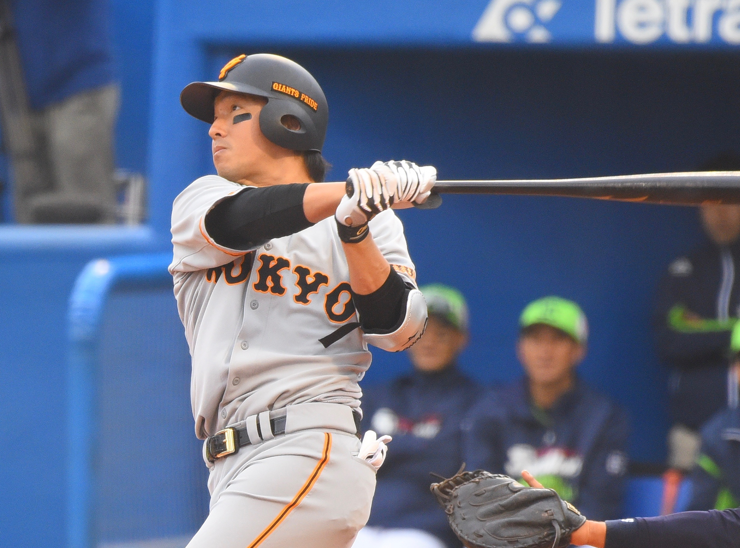 読売巨人軍 長野久義 2018年4月7日 神宮球場